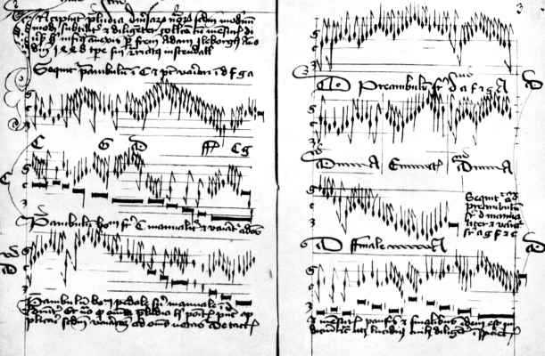 Anfang der handschriftlichen Orgeltabulatur des Adam Ileborgh, Stendal 1448 (ehemals Philadelphia, Bibliothek des Curtis Institute of Music)